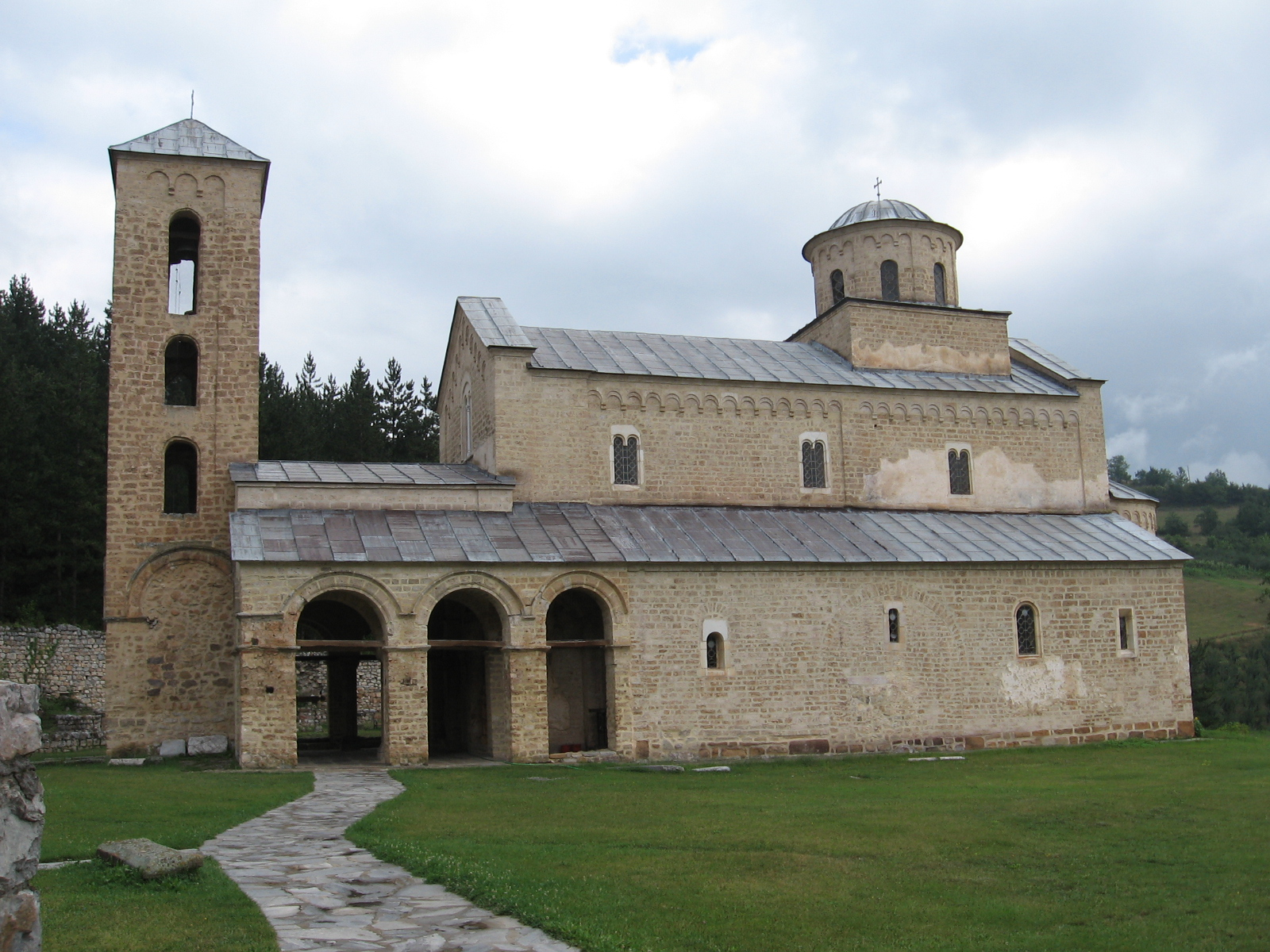 Sopoćani Monastery